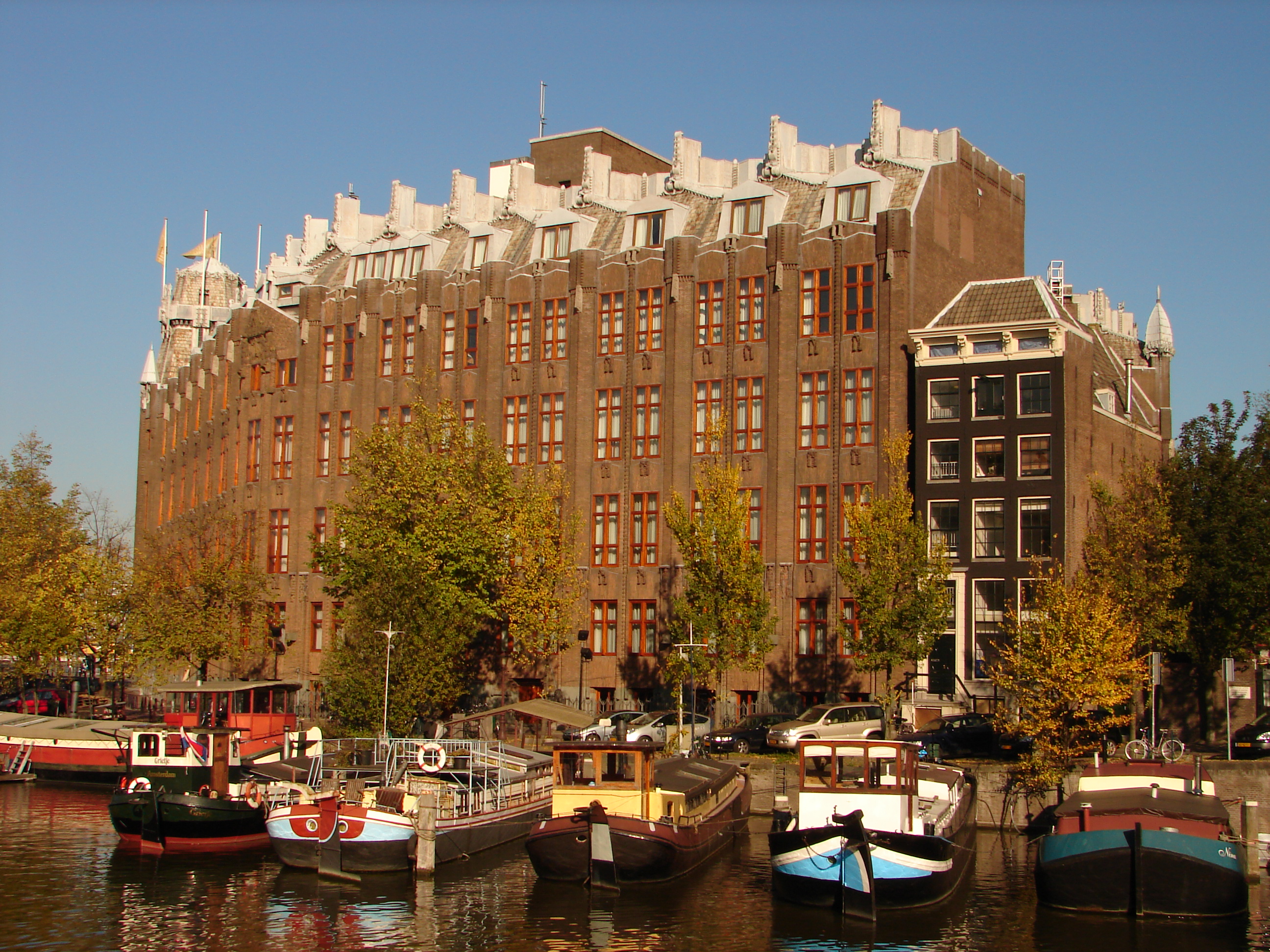 het Scheepvaarthuis te Amsterdam